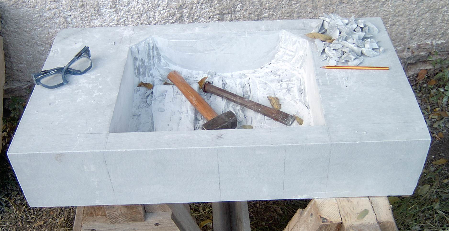 Waschtisch